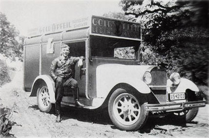 LKW der Firma Goldpfeil, um 1920